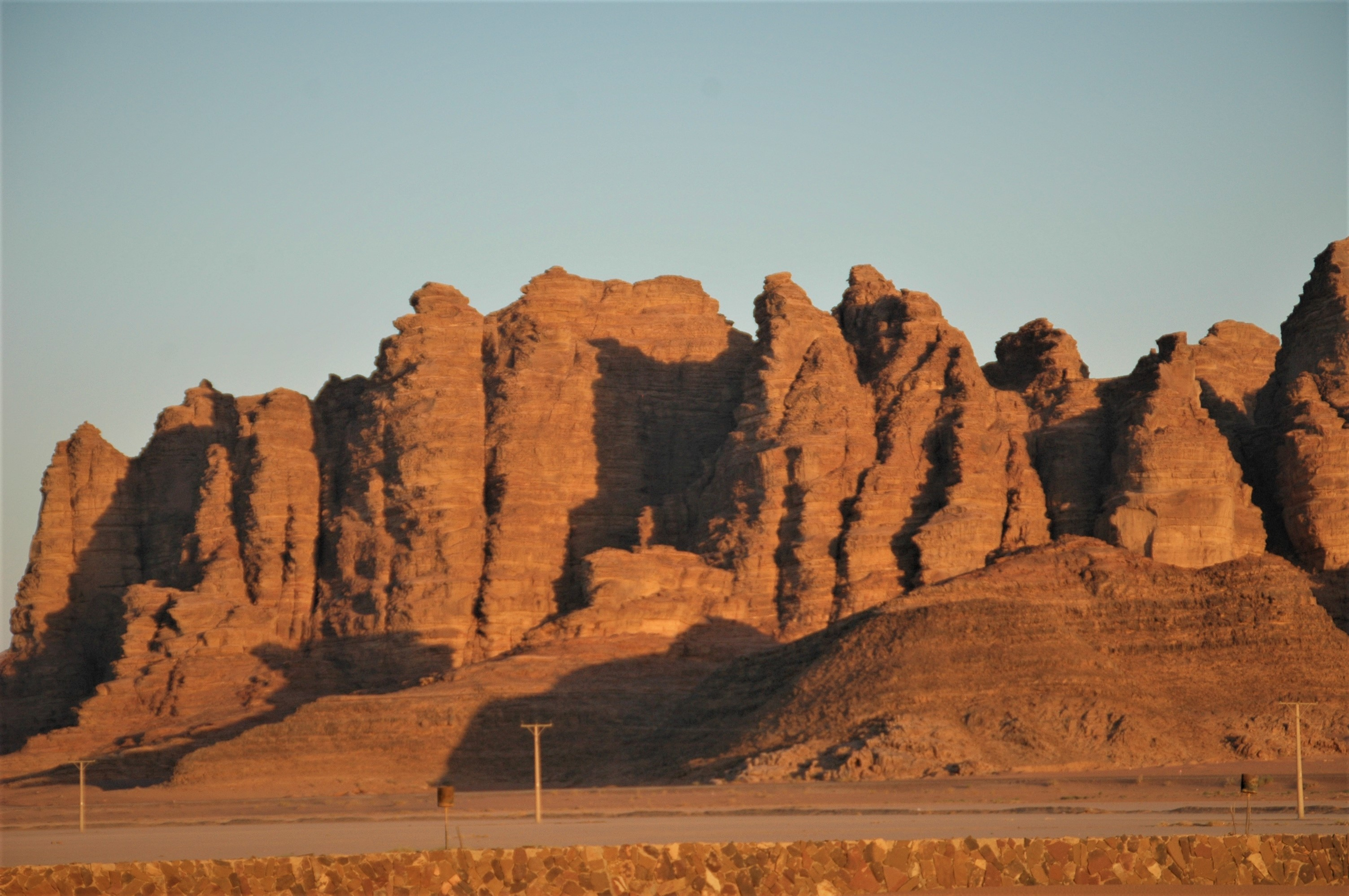 中文（台灣）: 瓦地倫保護區